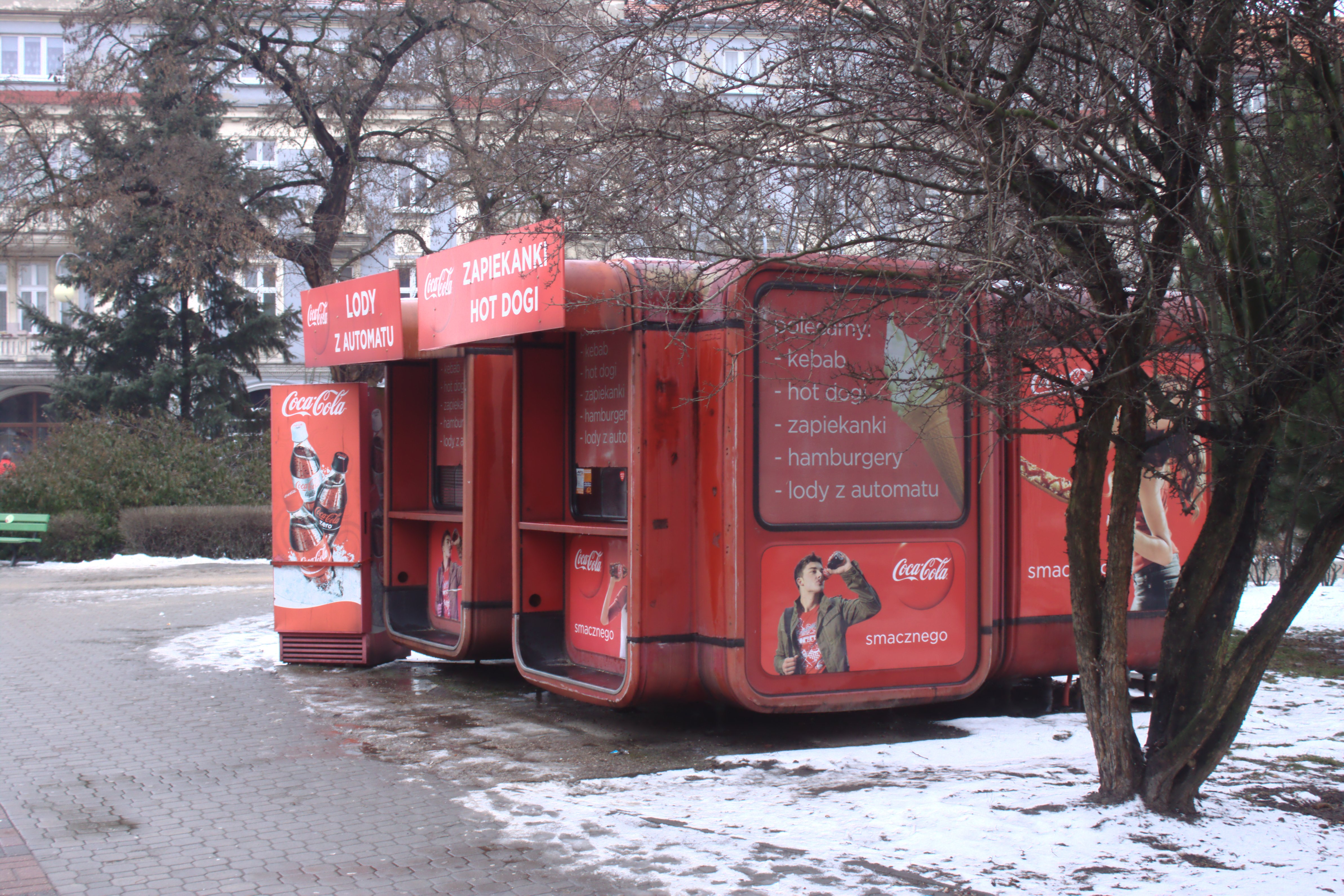 Stánek na zapékanky ve městě Kalisz, Velkopolské vojvodství, Polsko